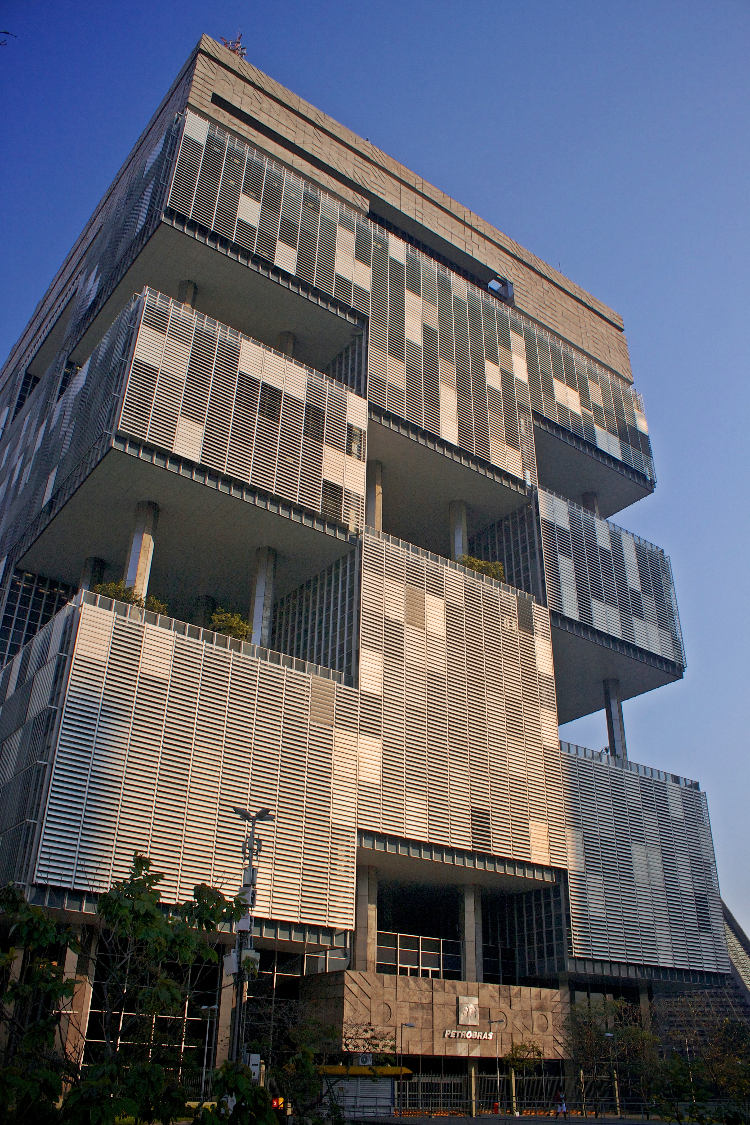 Sede da Petrobras no Rio de Janeiro, Brasil